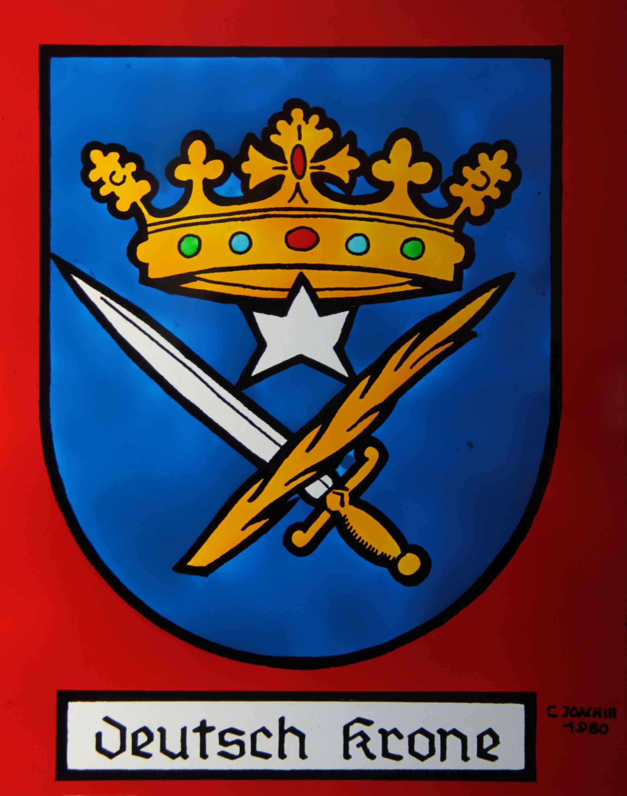 Foto des Wappens der Stadt Deutsch Krone